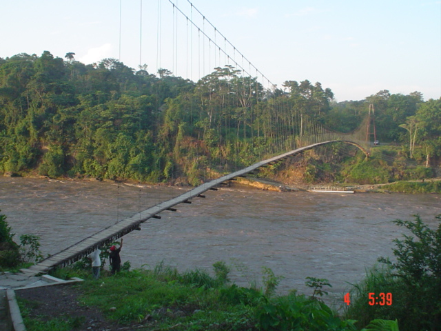 Puente colgante peatonal construido artesanalmente. L = 300 m Lugar: Río Aguarico - Provincia de Sucumbios - Ecuador Autor: Psc. Graciela Trelles, cedido a Wikipedia Fecha: Abril 2006